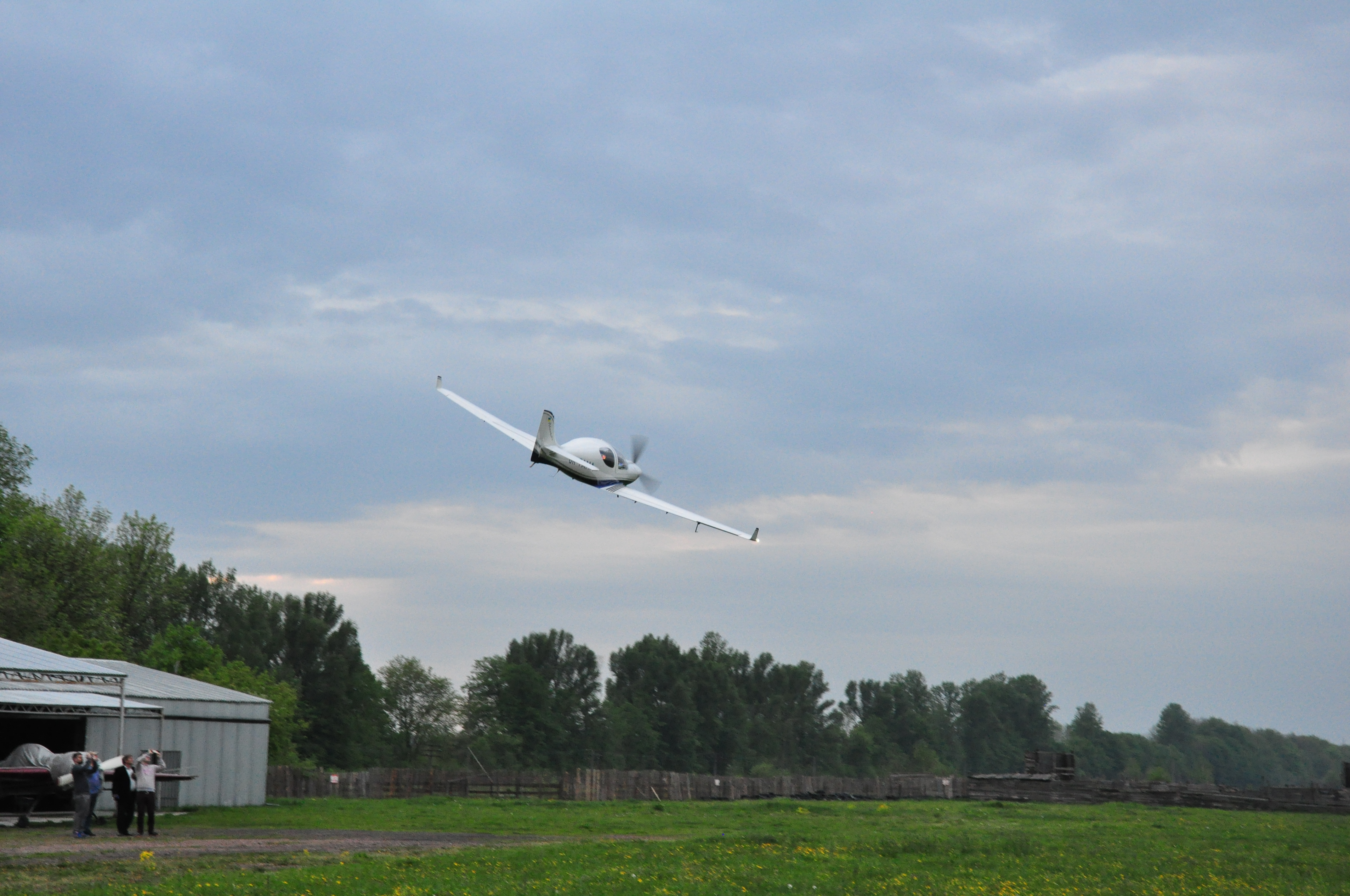 спортивний аеродром коломия